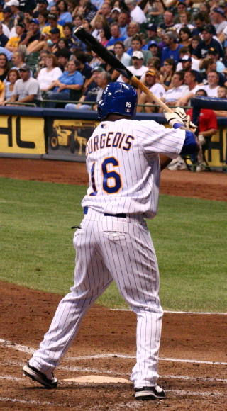 Jason Bourgeois